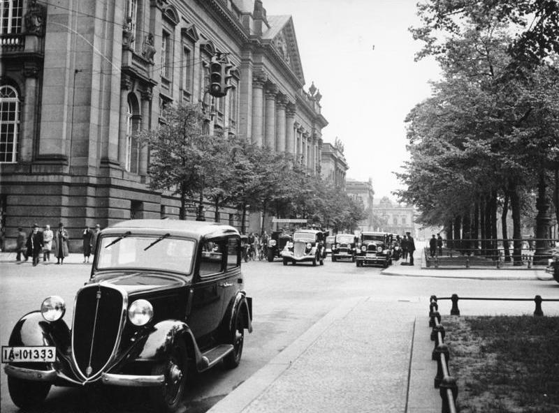 Preußische Staatsbibliothek